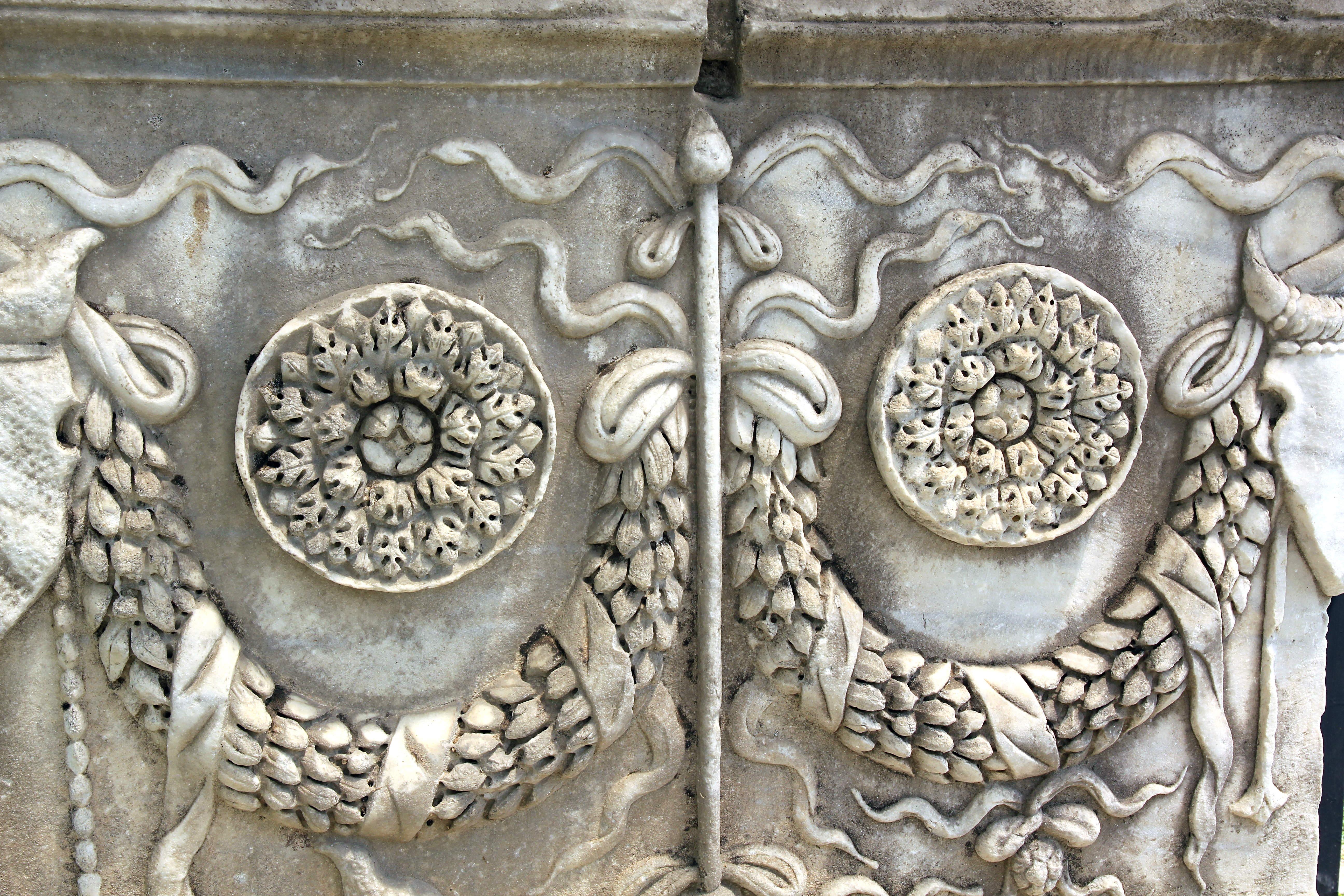 Prusias ad Hypium, antike bithynische Stadt bei Konuralp, Provinz Düzce, Nordwesttürkei, Konuralp-Museum, Girlandensarkophag, Detail